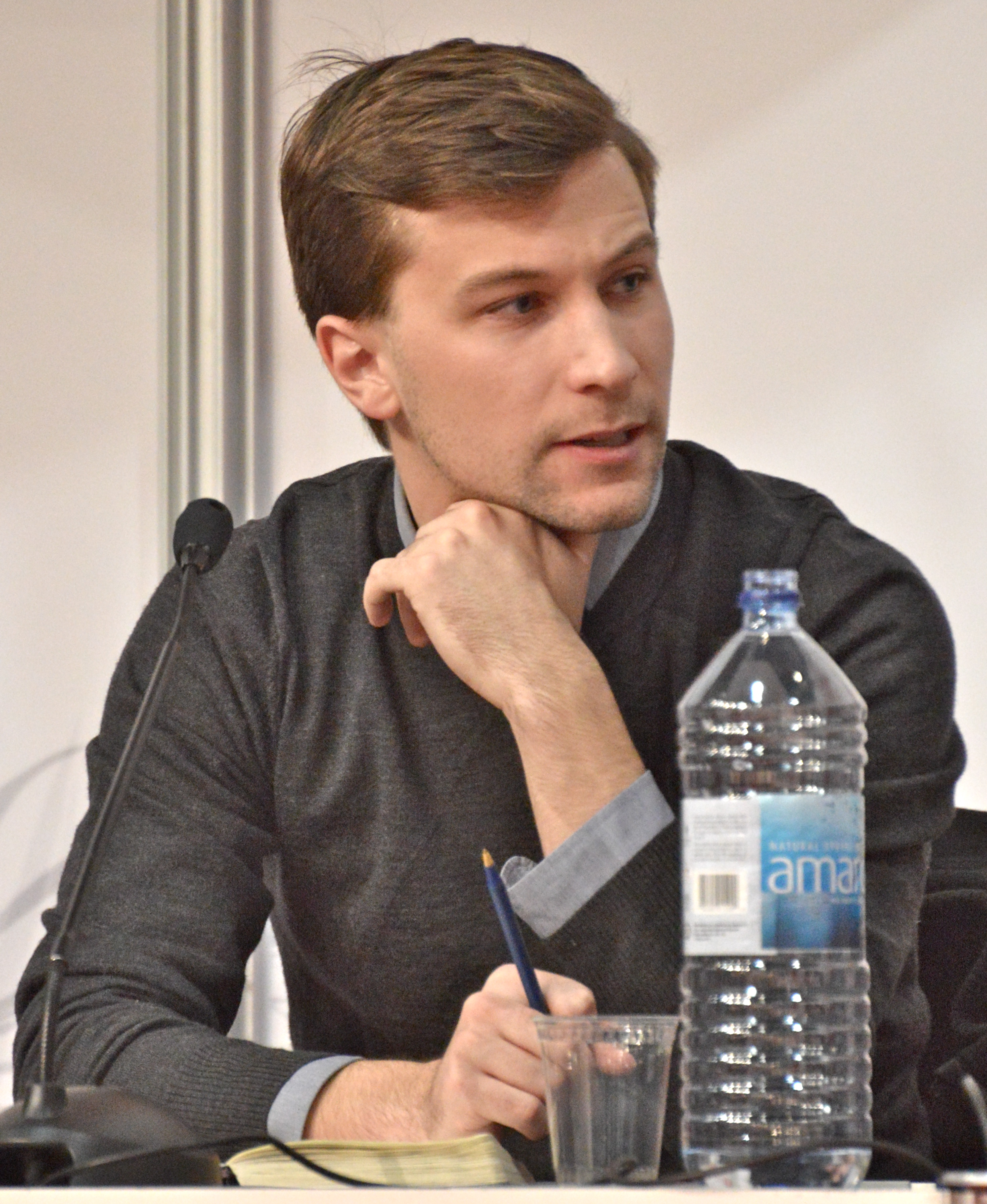 Gabriel Nadeau-Dubois au Salon international du livre de Québec 2014